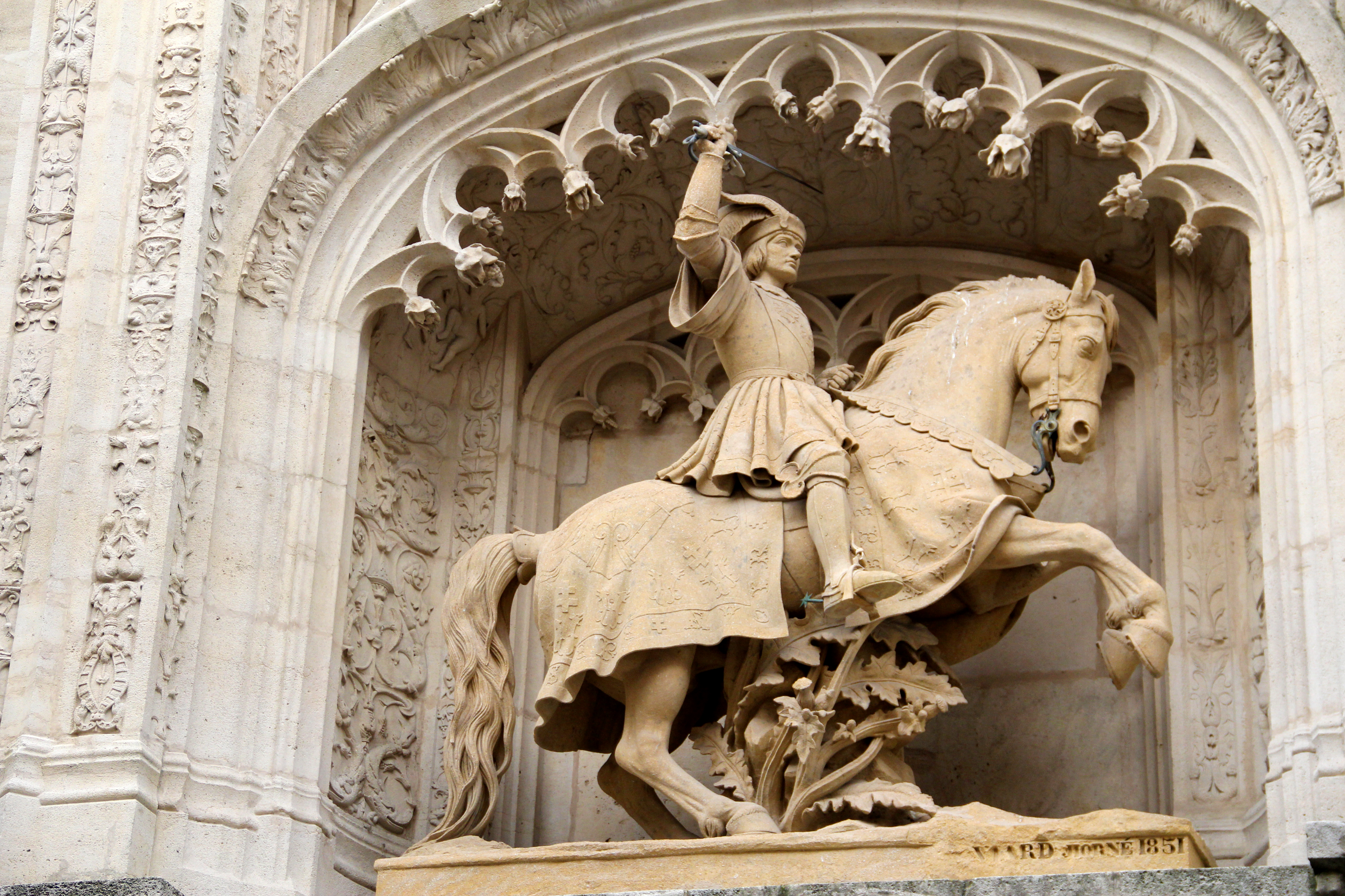 Palais des Ducs de Lorraineécurie, école, cour, élévation .